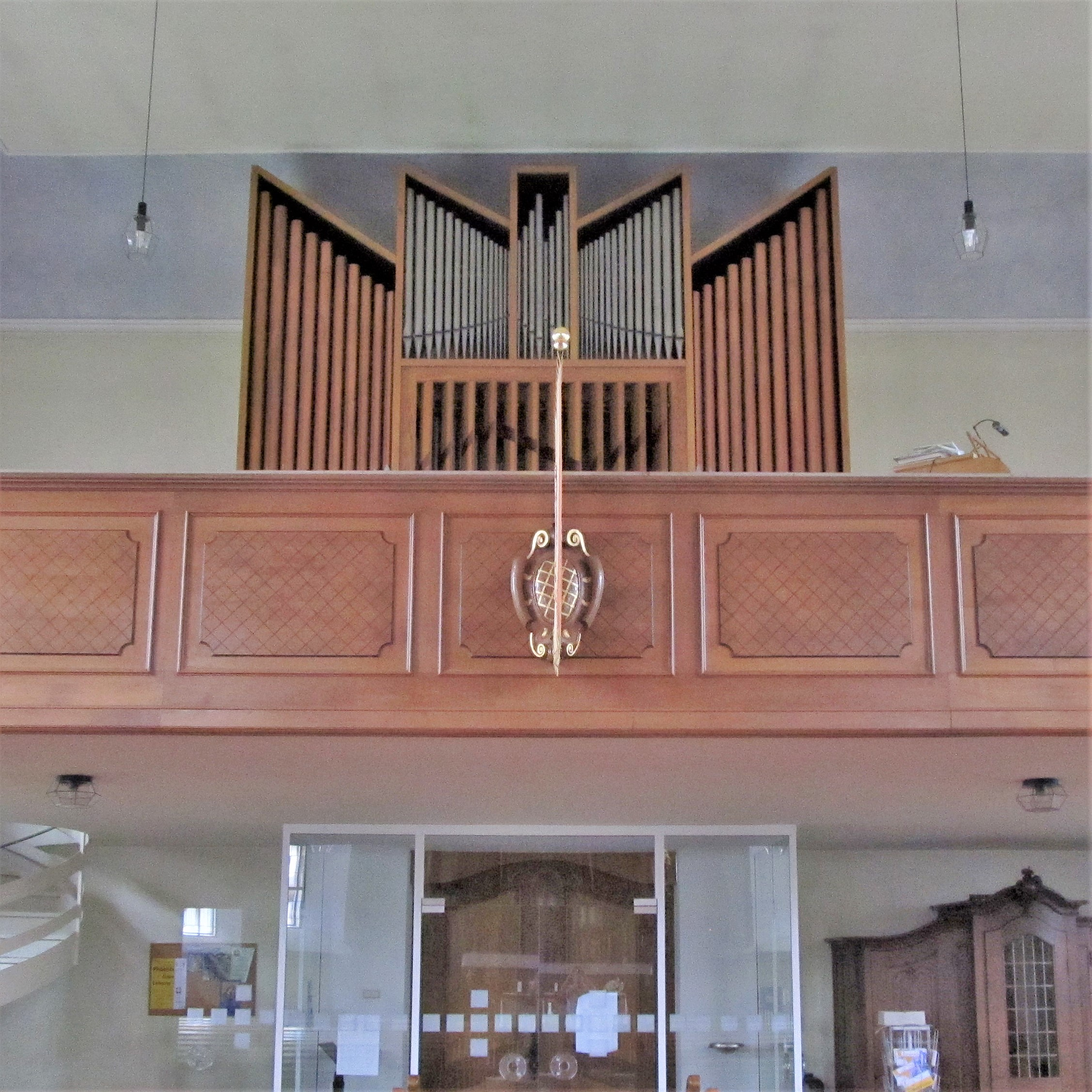 Orgelempore der katholischen Pfarrkirche St. Martin in Habkirchen, Gemeinde Mandelbachtal, Saarland